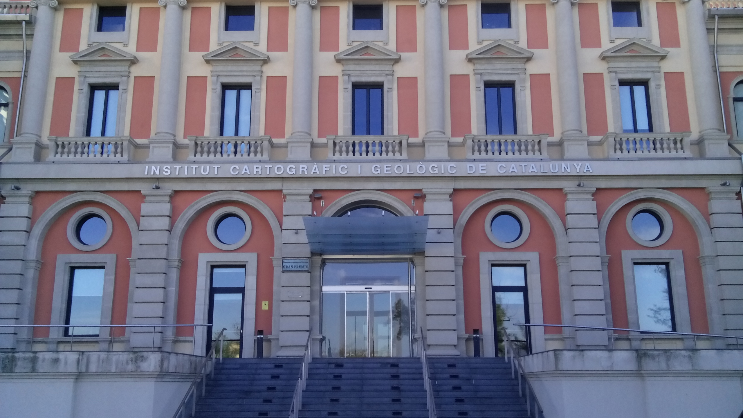 Façana i entrada principal de l'ICGC